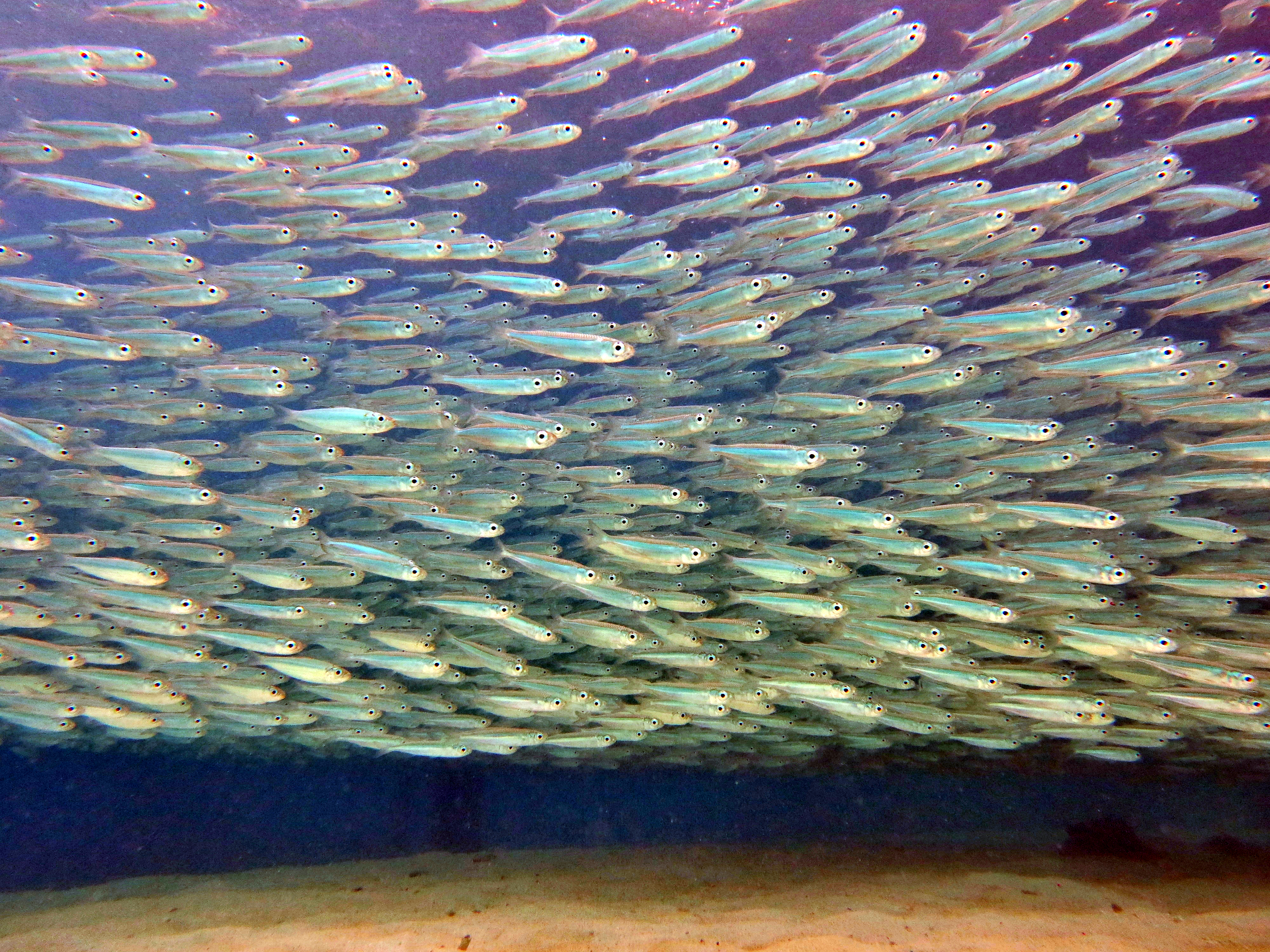 Un banc d'athérines Atherinomorus lacunosus juvéniles aux Maldives (Landaagiraavaru, atoll de Baa).